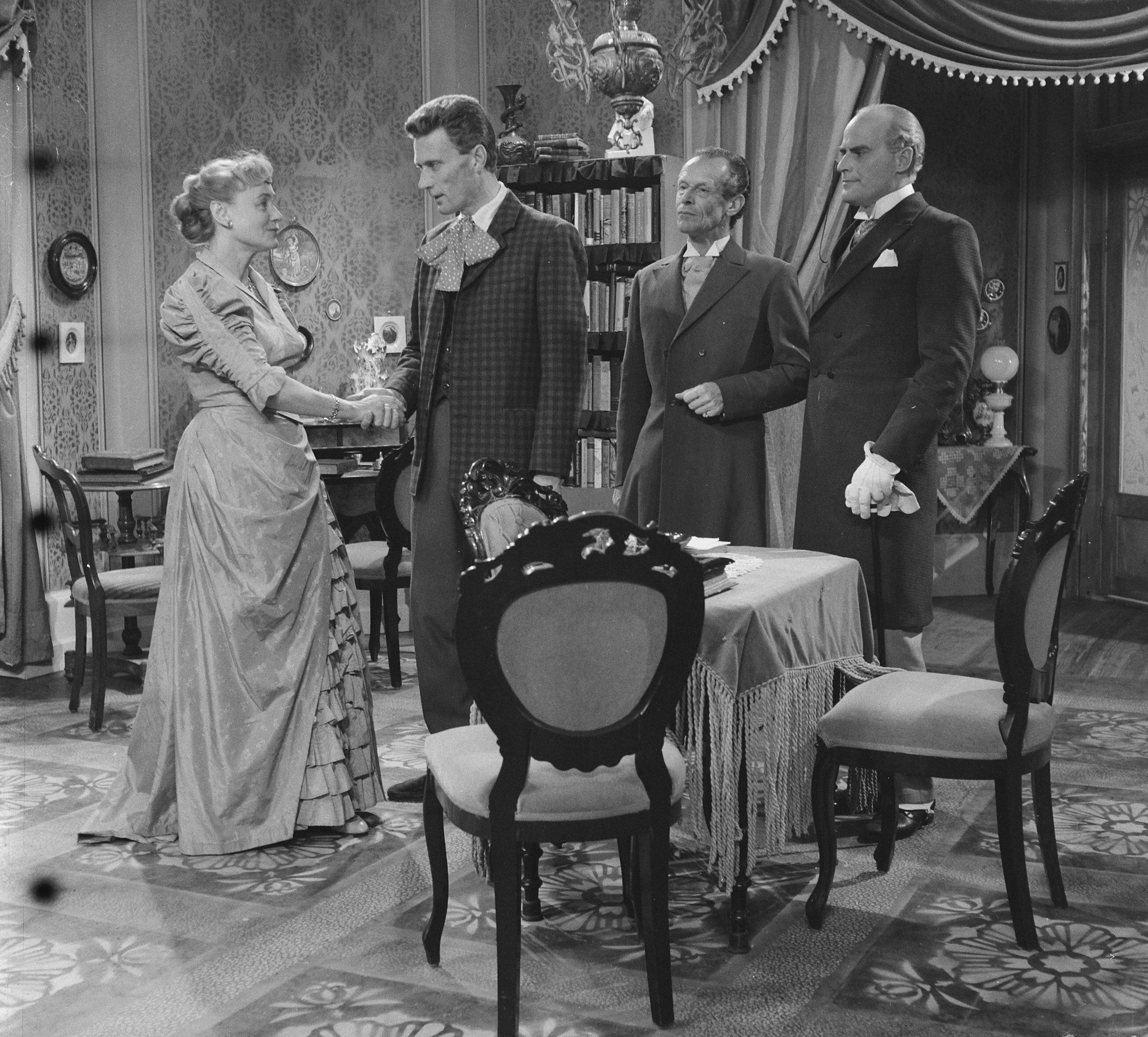 Collectie / Archief : Fotocollectie Anefo Reportage / Serie : TV-spel "Hedda Gabler" onder regie van Ton Lensink Beschrijving : vlnr. Rie Gilhuys (Hedda Tessman, Frans van der Lingen (Ejert Lövberg) , Gijsbert Tersteeg (Jörgen Tessman) en Lo van Hensbergen (Brack) Datum : 27 mei 1959 Trefwoorden : acteurs, televisiedrama's Persoonsnaam : Gilhuys, Rie; Hensbergen, Lo van; Lingen, Frans van der; Tersteeg, Gijsbert Fotograaf : Lindeboom, Henk / Anefo Auteursrechthebbende : Nationaal Archief Materiaalsoort : Negatief (zwart/wit) Nummer archiefinventaris : bekijk toegang 2.24.01.03 Bestanddeelnummer : 910-4018 Reacties Geplaatst door Televisiespel liefhebber op 29 augustus 2017 - 17:36. AVRO Televisie. Uitgezonden op 28 mei 1959